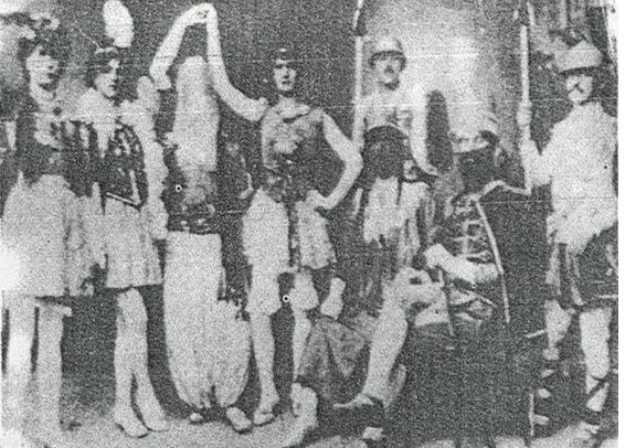 Karnevalet Shkoder 1897